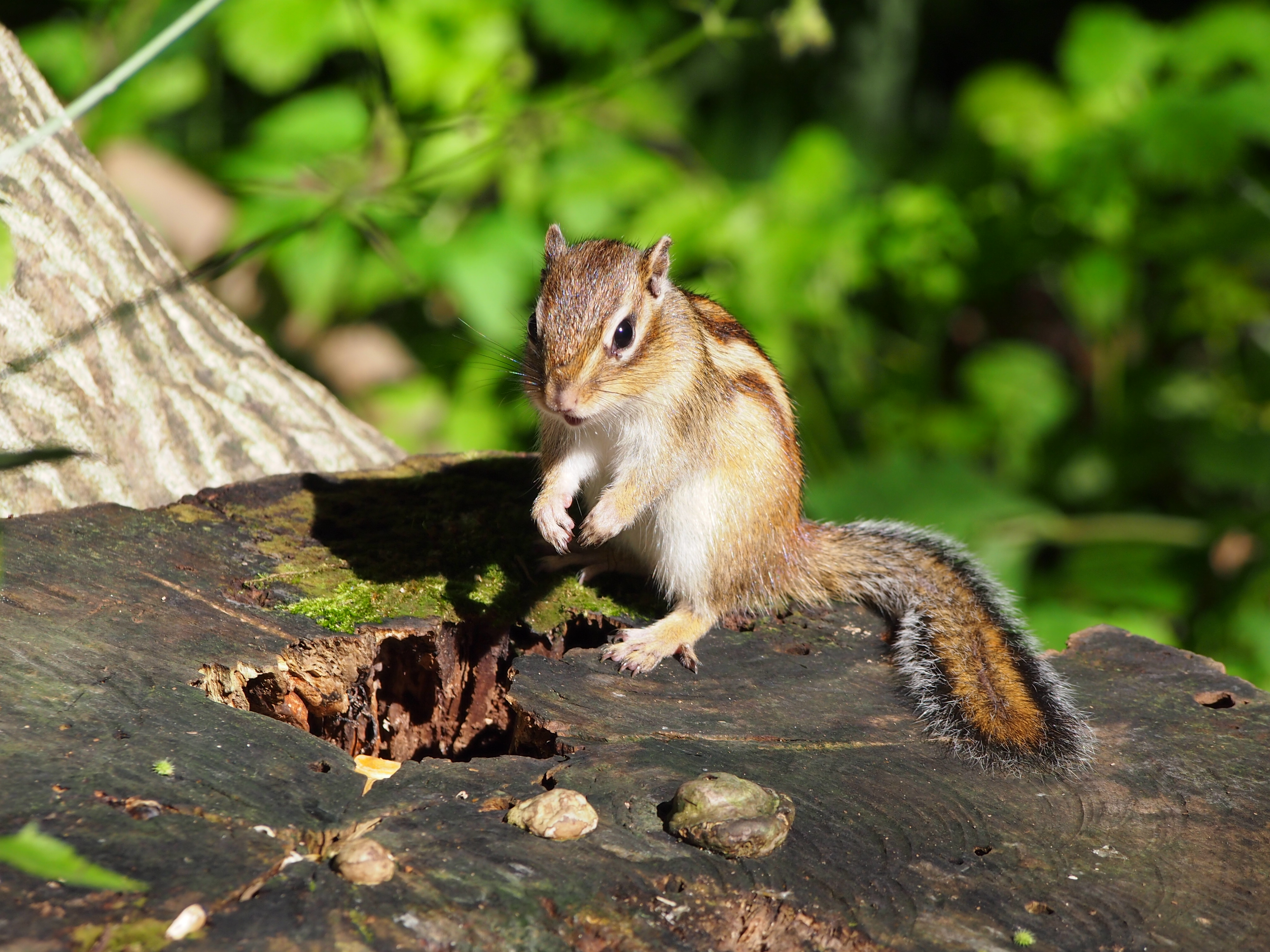 北海道札幌市円山公園のエゾシマリス